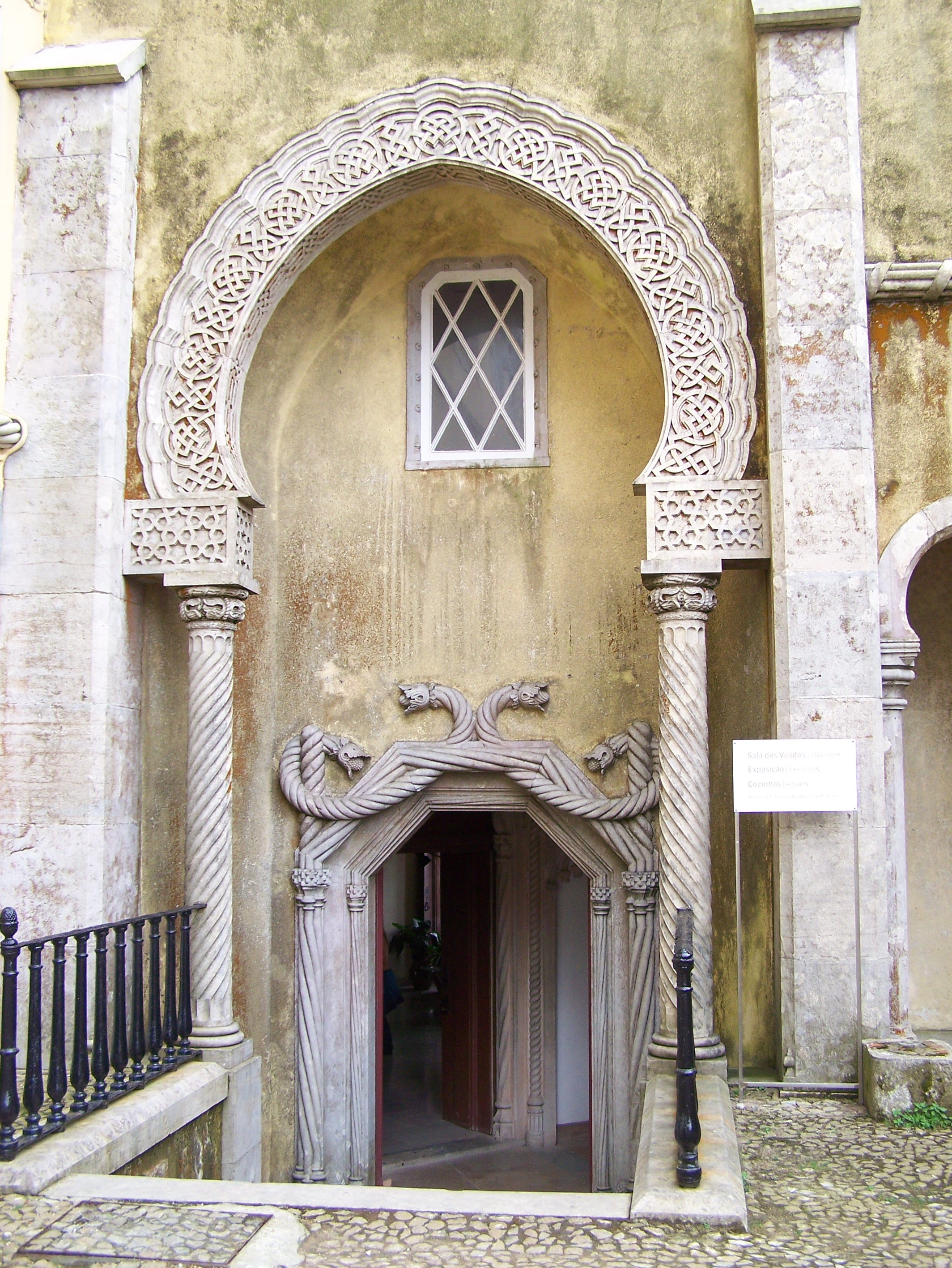 Palácio Nacional da Pena, Sintra, Portugal.